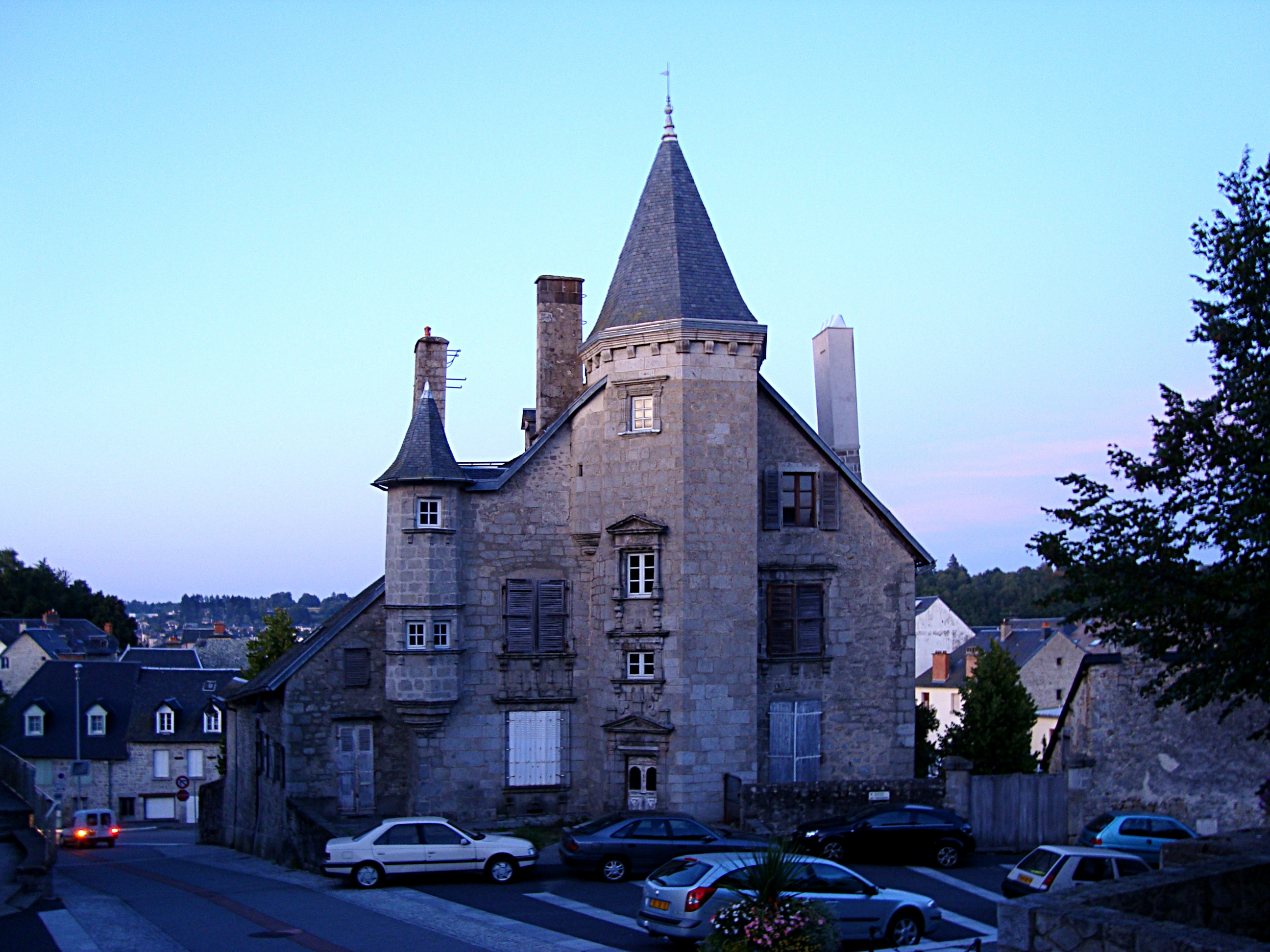 L'hôtel Ventadour à Ussel (Corrèze).